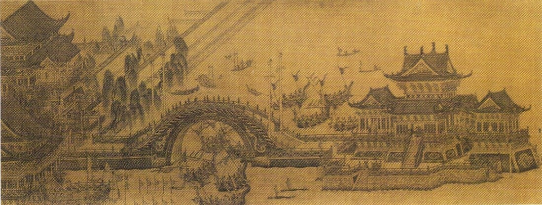 Fête des bateaux-dragons, par le peintre chinois Wang Zhenpeng (XIVe siècle), section d'un rouleau portatif 25x114,6 centimètres, encre sur soie, dynastie des Yuan. Cette version représente l'une des nombreuses peintes par le peintre sur le même sujet. Musée national du Palais impérial à Taipei.